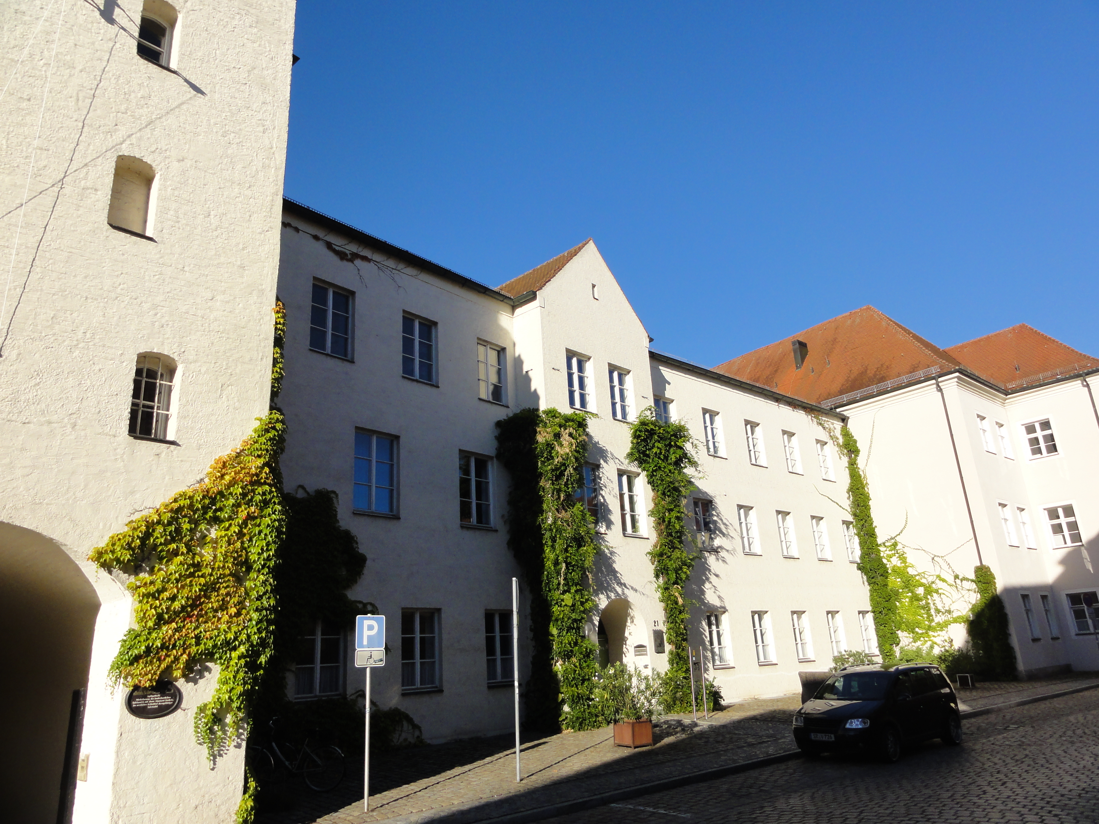 Straubing - Herzogsschloss (Finanzamt) Info GPS data may be inaccurate. EXIF data regarding date and time may be inaccurate.